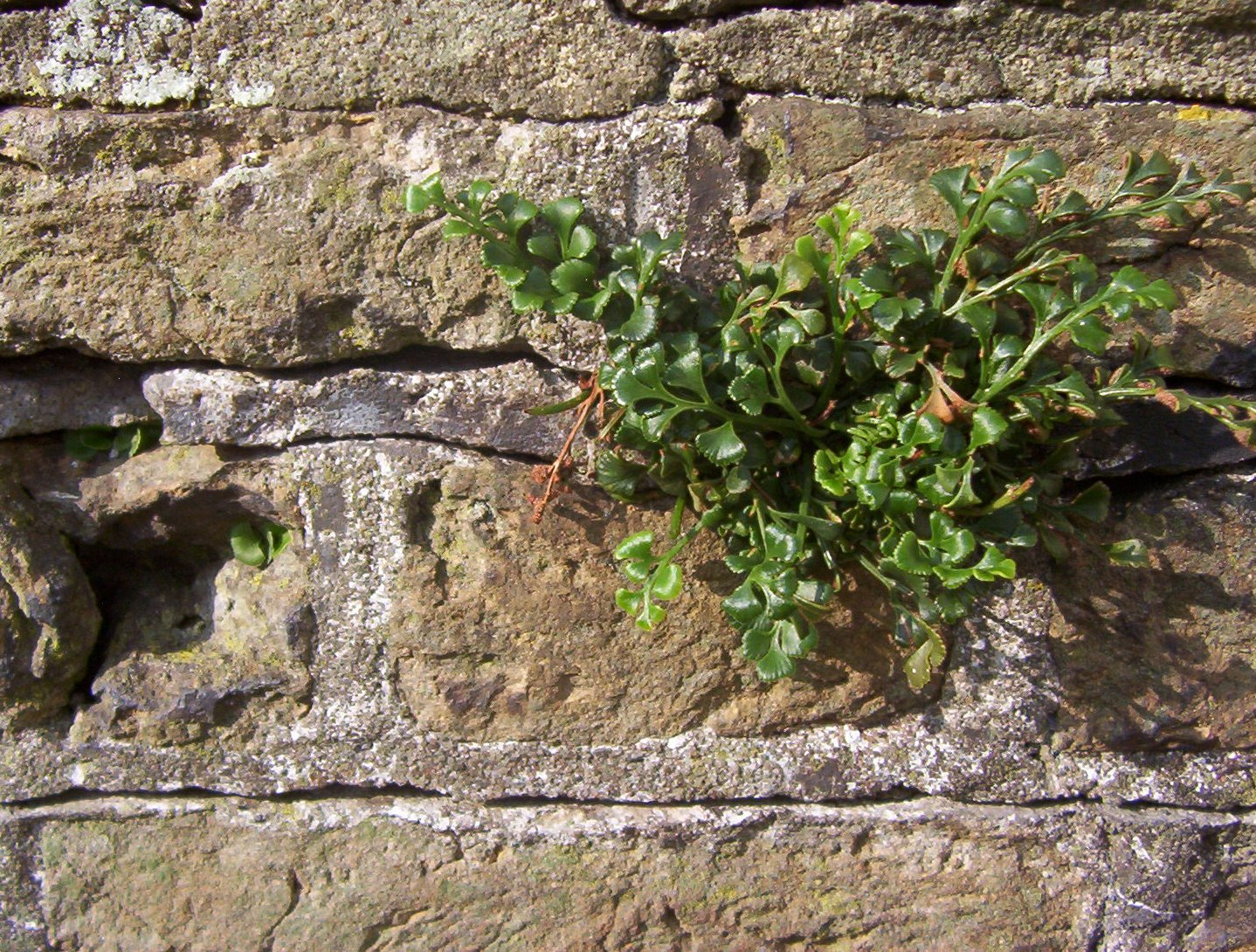 Asplenium ruta-muraria (Aspleniaceae). Eigen foto in Haastrecht 6 Oktober 2005